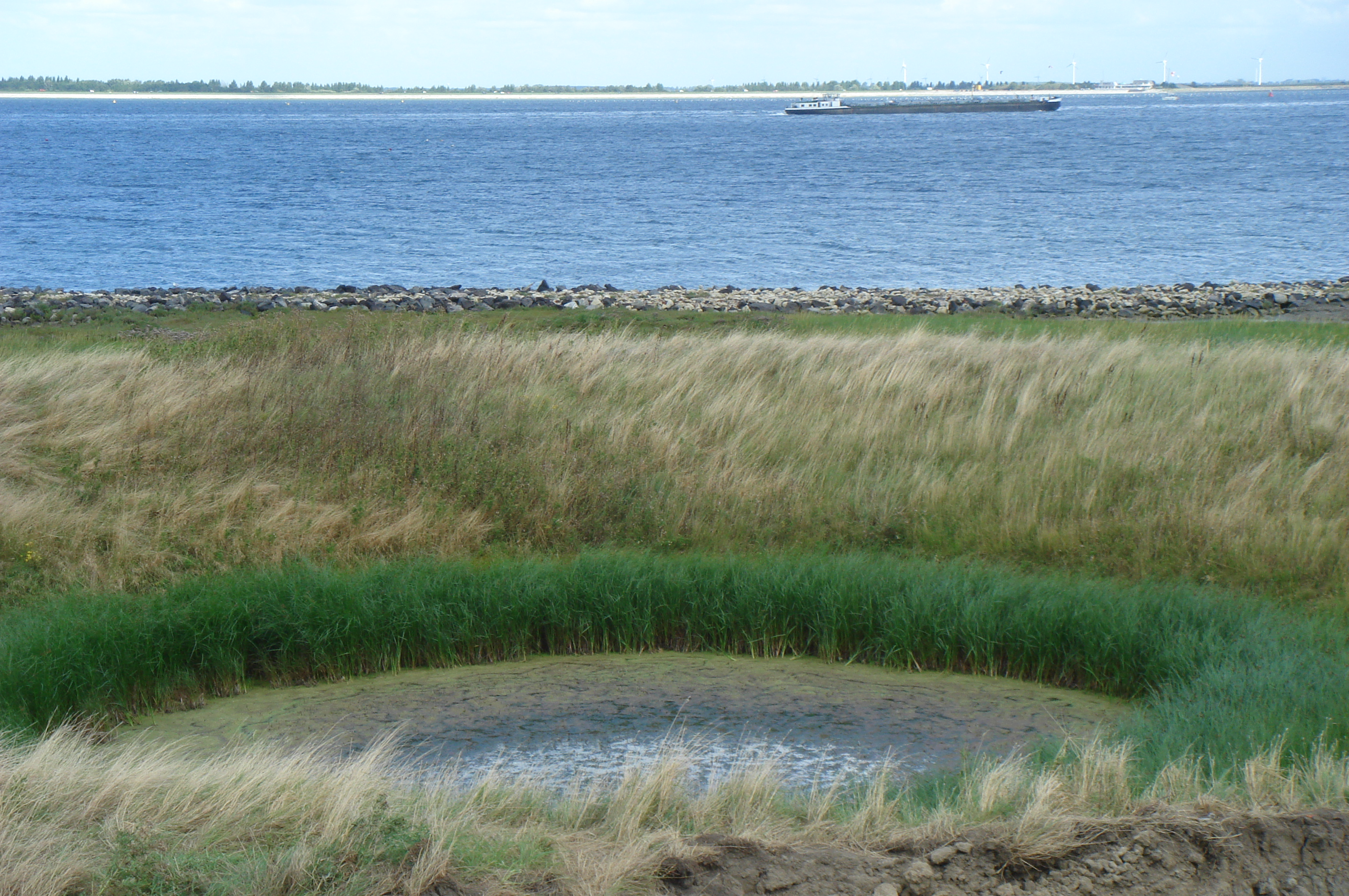 Bruinisser Stelberg bij Sint Philipsland (30 augustus 2009). Foto: Daniel van der Ree